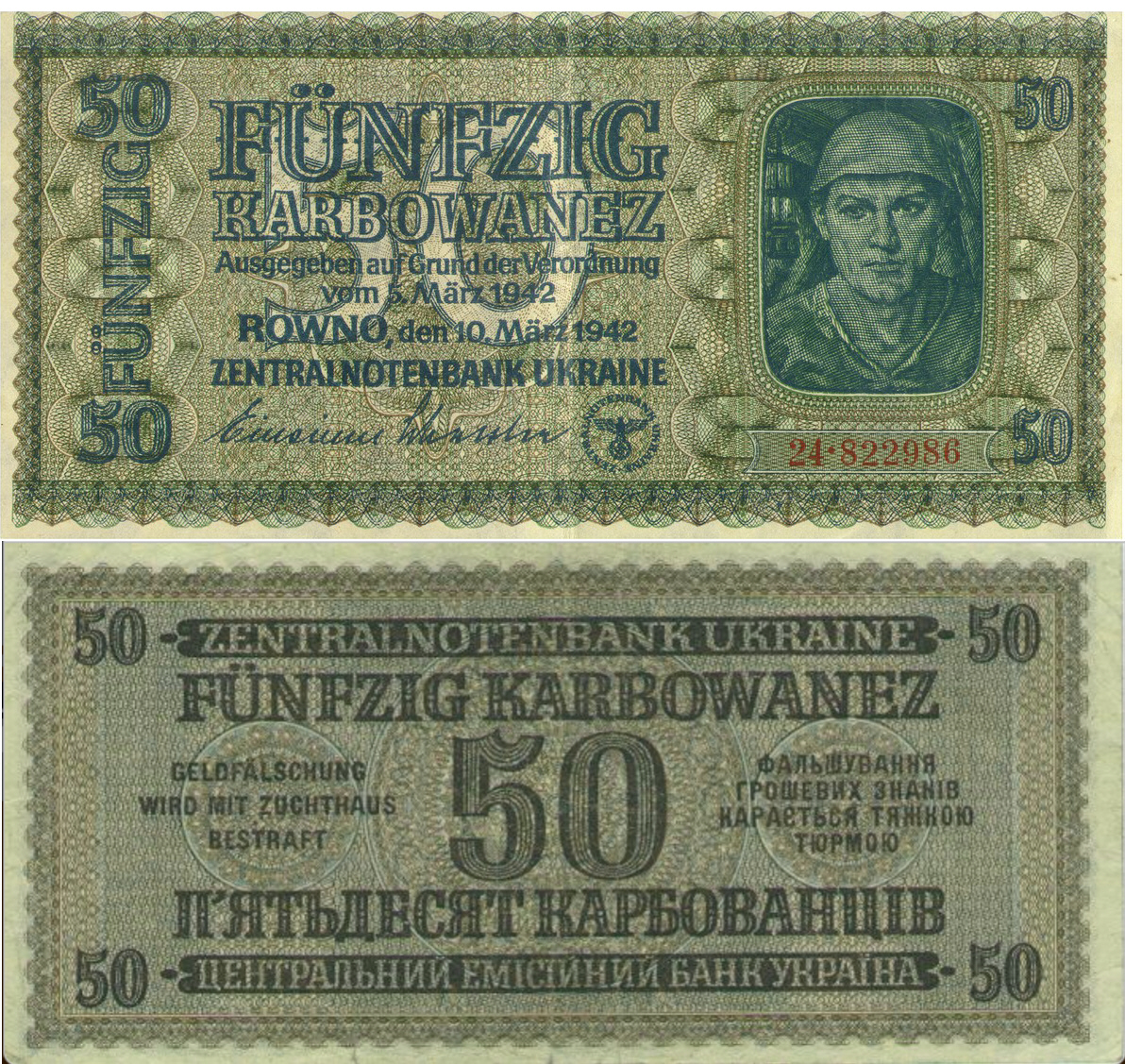 50 Karbowanez = 5 Reichsmark